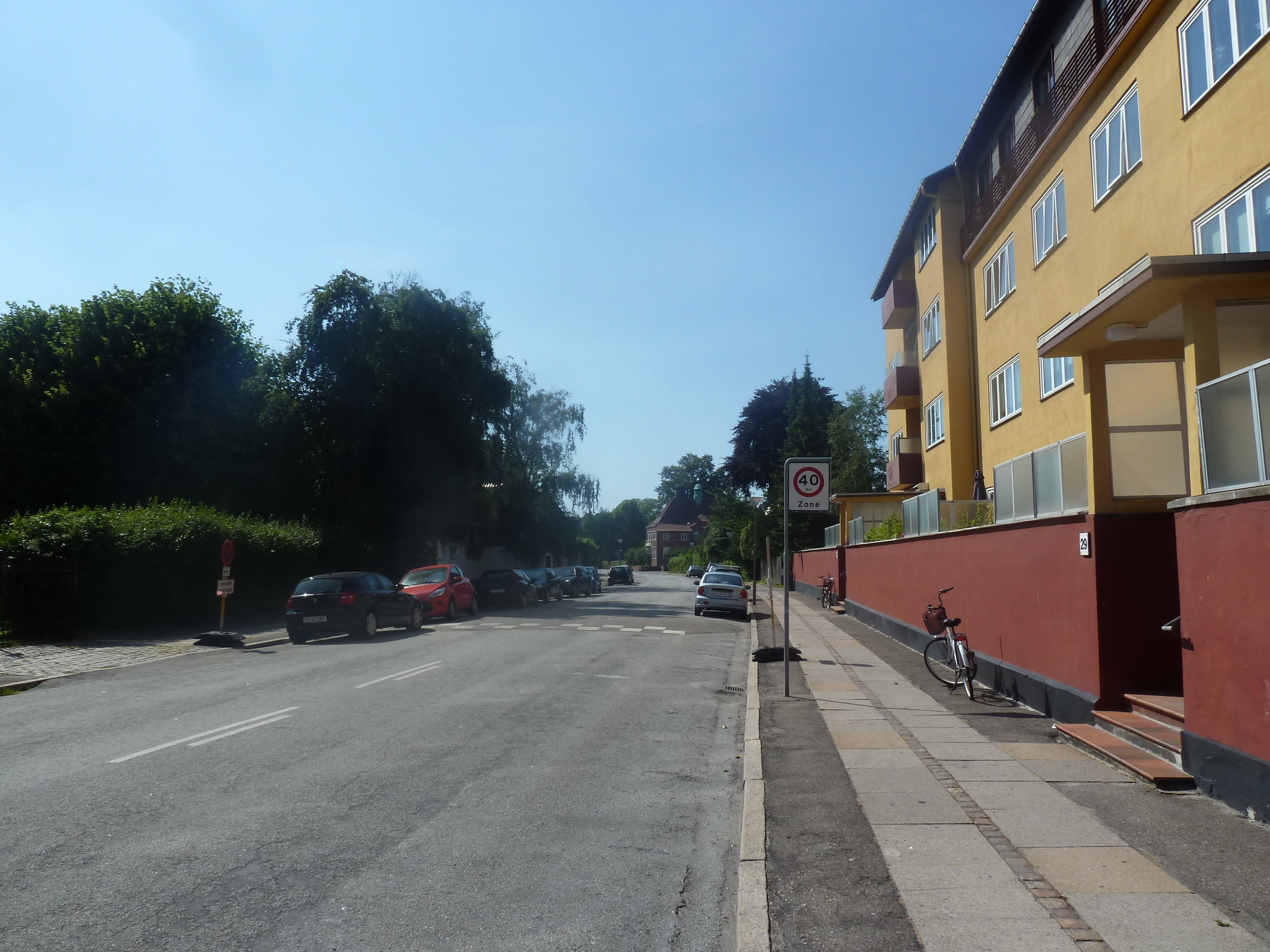 The street Gammel Vartov Vej in Hellerup in Copenhagen.